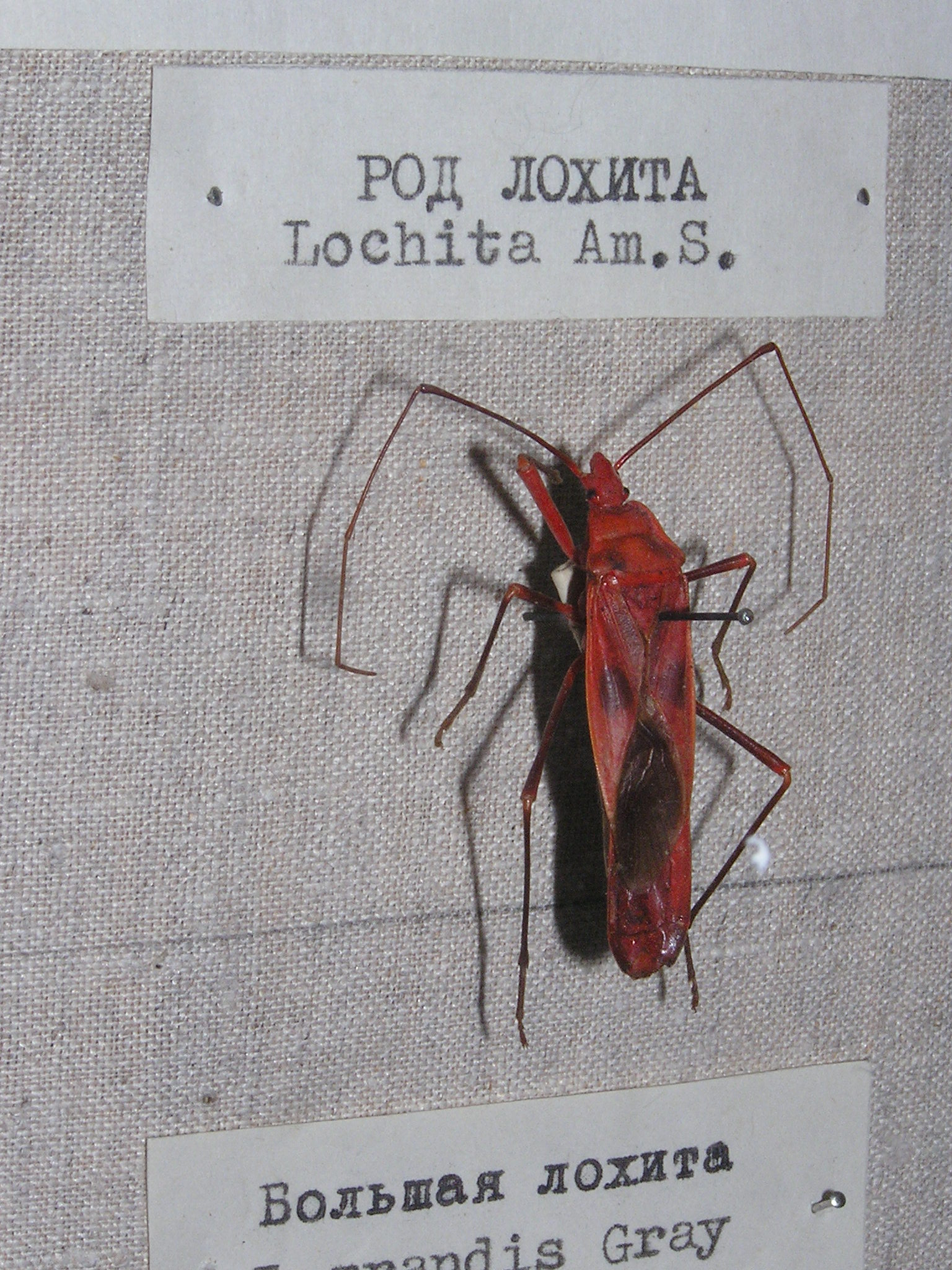 Зоологический музей в Санкт-Петербурге. Большая лохита This photograph taken in Zoological Museum of the Zoological Institute of the Russian Academy of Sciences Note: It is only museum co-ordinates, instead of an area of live animals.